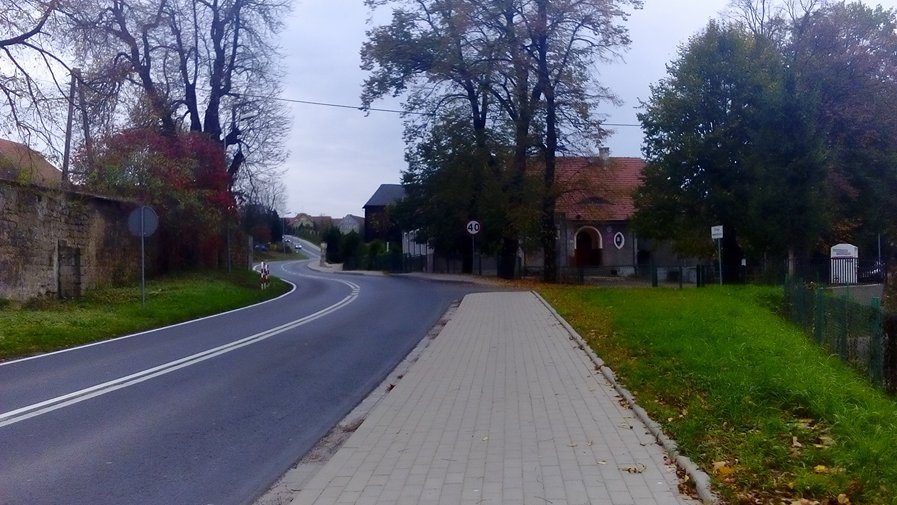 Widok na szkołę (po lewej), w oddali kościół, zdjęcie wykonane przy DW364 w kierunku Lwówka Śląskiego